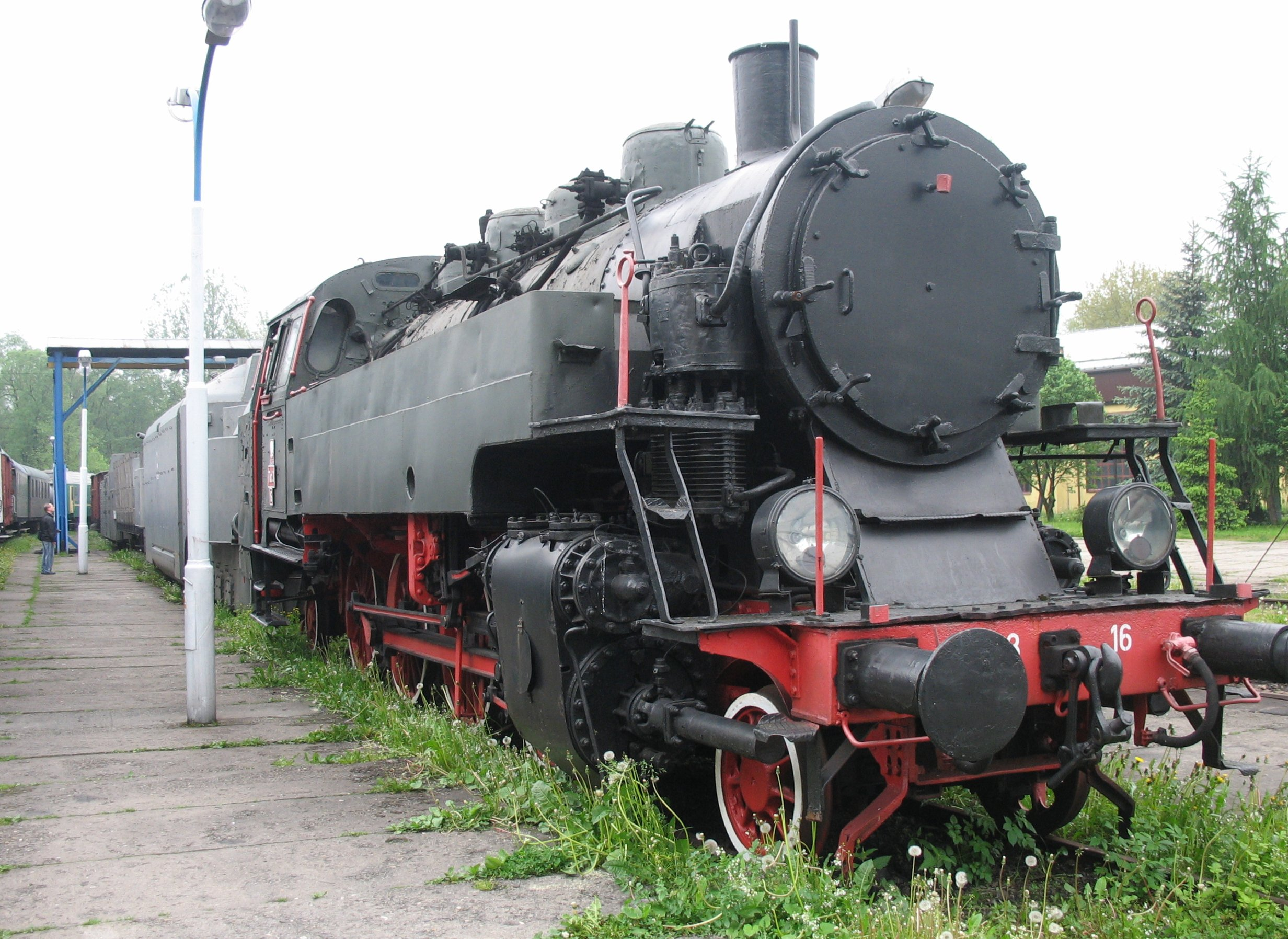 Lokomotywa parowa TKt3-16. Eksponat Skansenu w Chabówce.